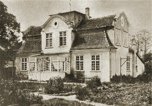 Gdańsk Wrzeszcz Górny, Dwór Srebrniki.